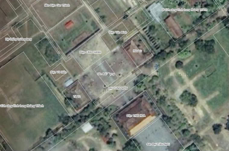 Các công trình khu vực Tử Cấm Thành. Sau Đại Cung Môn là sân bái mạng có đặt hai vạc đồng (đánh dấu bằng hai chấm tròn). Hay dãy hành lang hai bên dẫn đến Tả Vu và Hữu Vu. Đối diện Đại Cung Môn, qua sân bái mạng, là Điện Cần Chánh